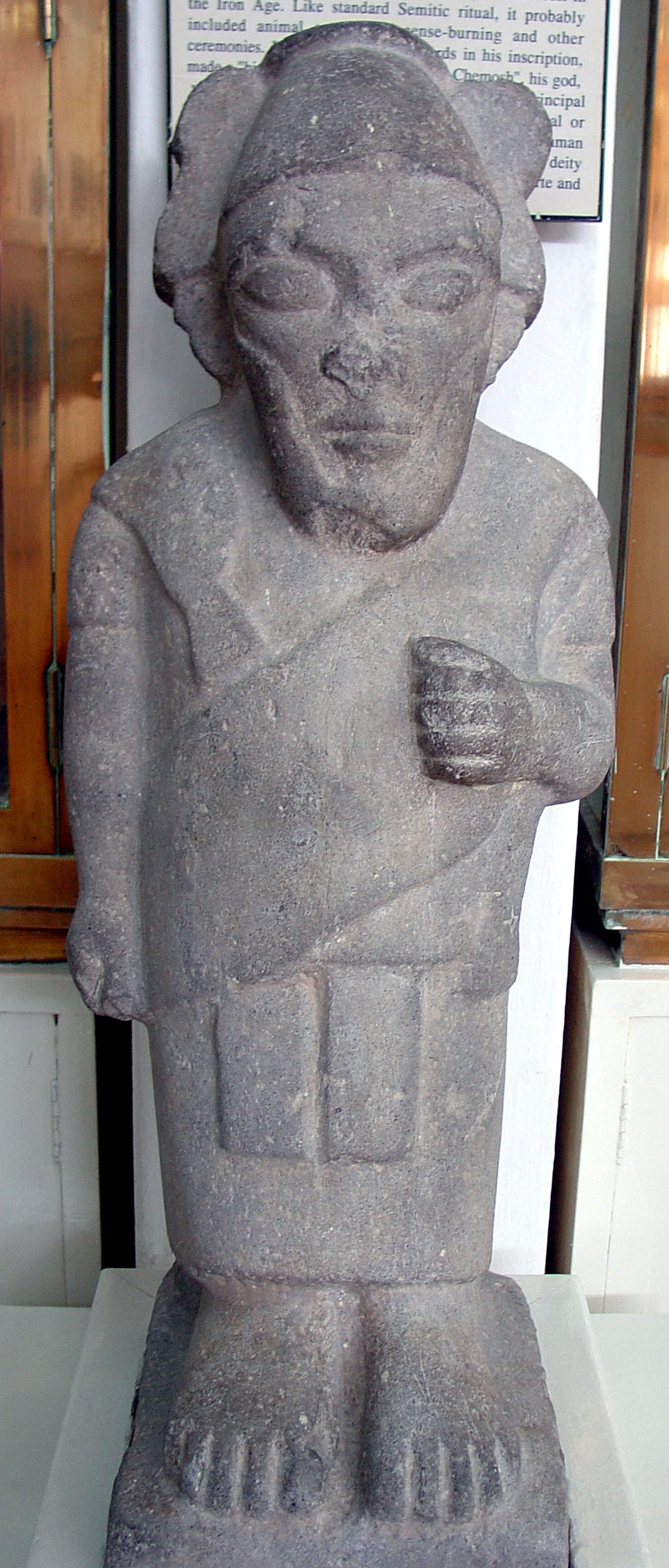 Statue without background objects